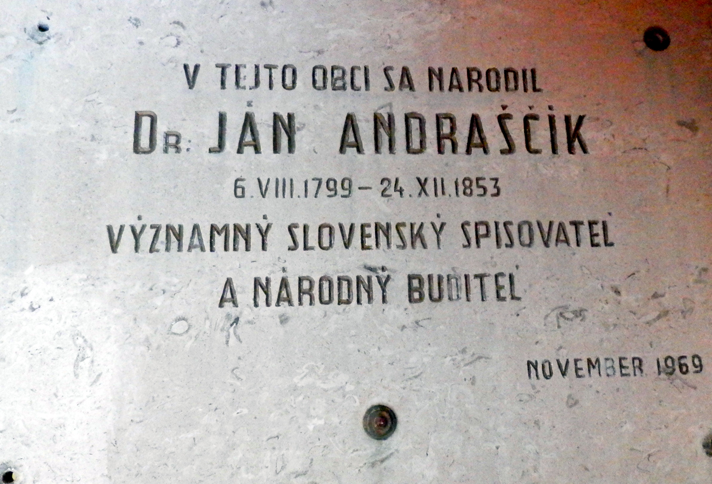 Obec Lipovce. Okres Prešov..Pamätná tabuľa. Národná kultúrna pamiatka.